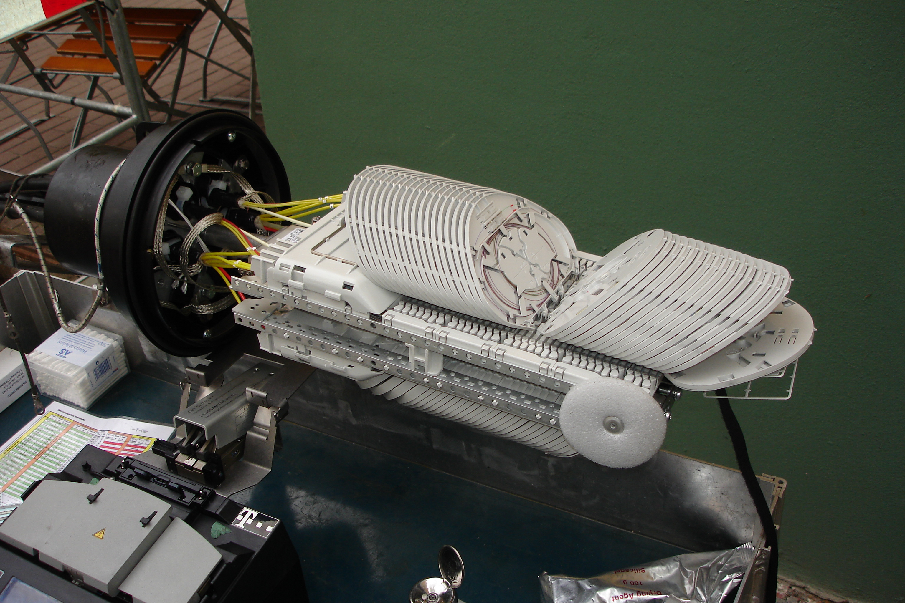 Eine Glasfasermuffe (Gelblockausführung) bei der Installation. In den einzelnen Kassetten werden die einzeln gespleißten Glasfasern eingelegt.